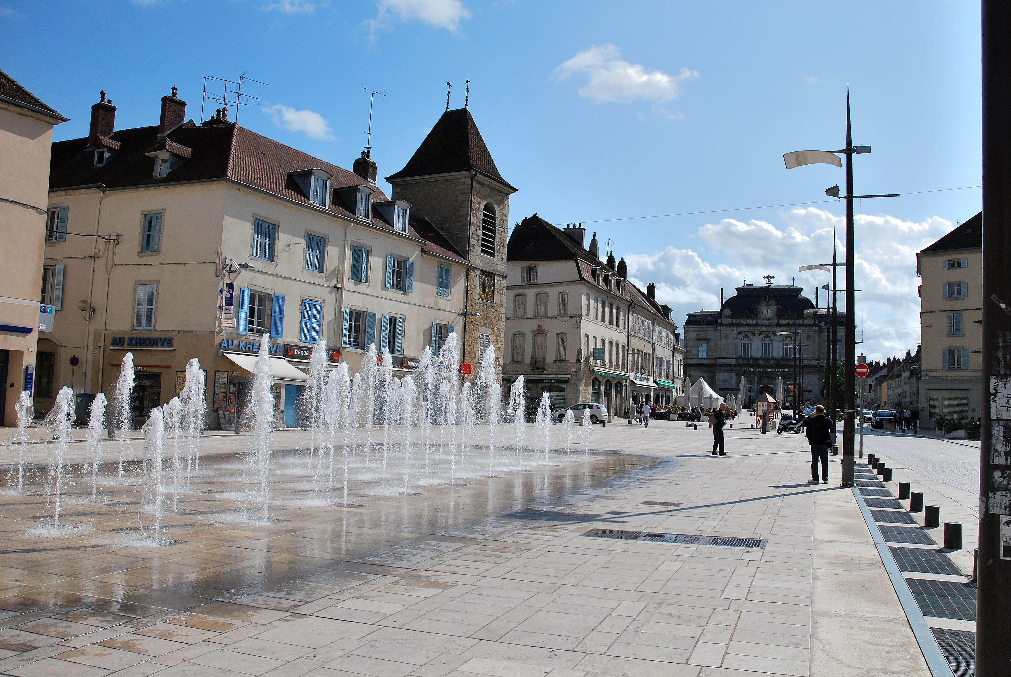 place de la liberté